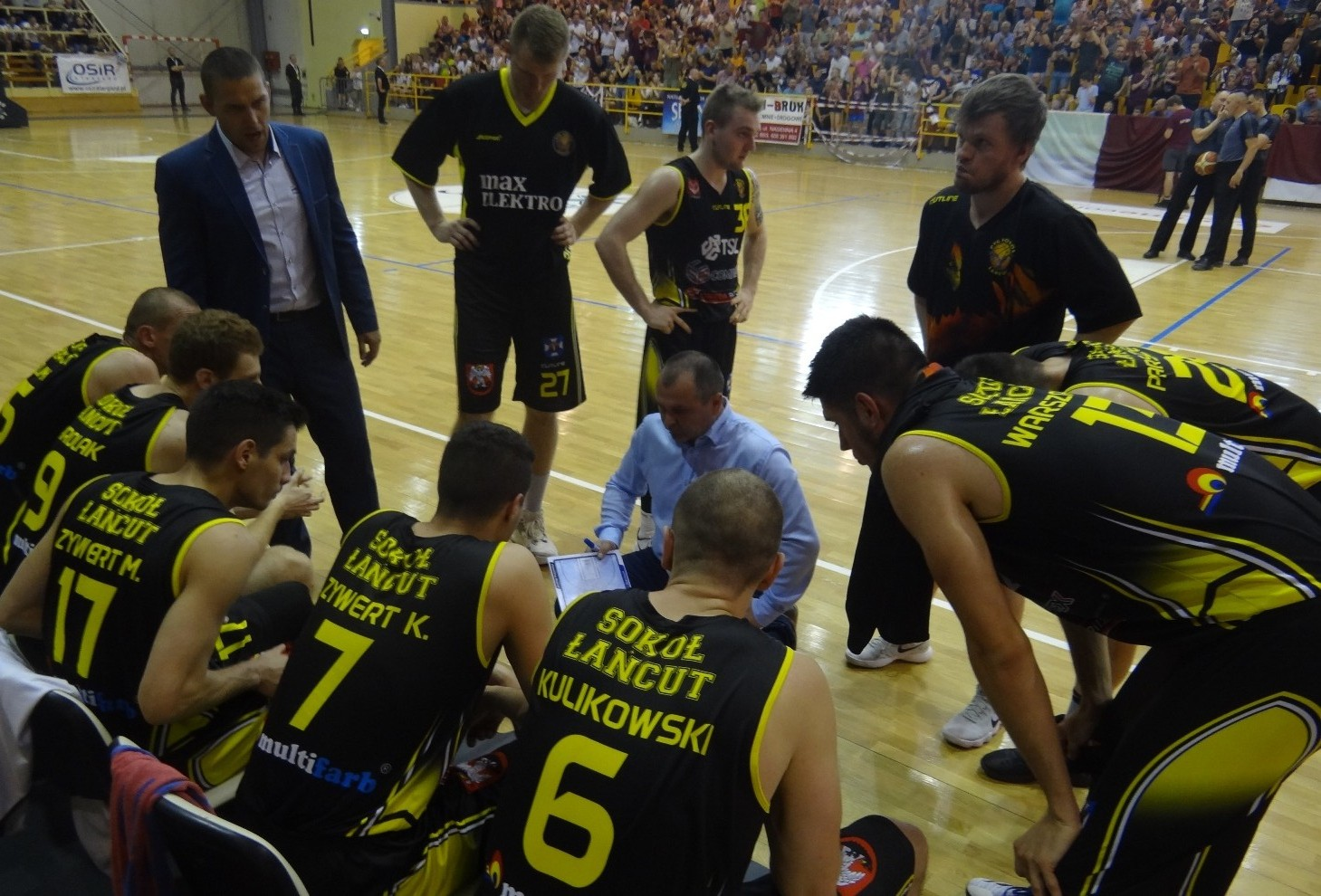 Sokół Łańcut w finale ze Spójnią (12.05.2018)